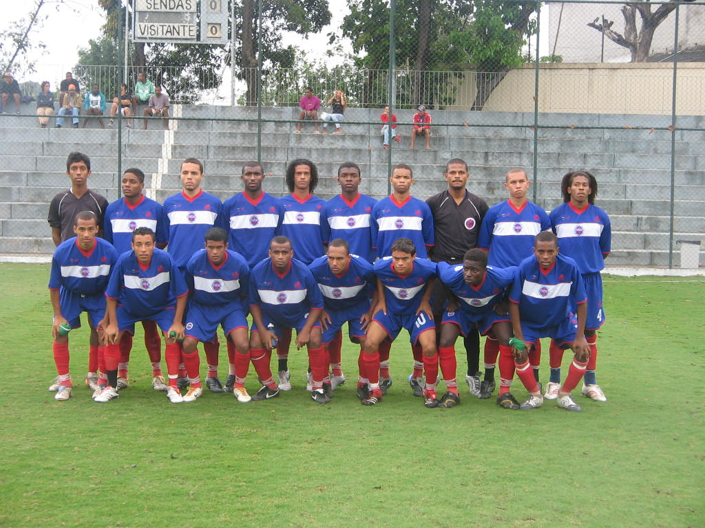 Futuro Bem Próximo Atlético Clube, em 2007.